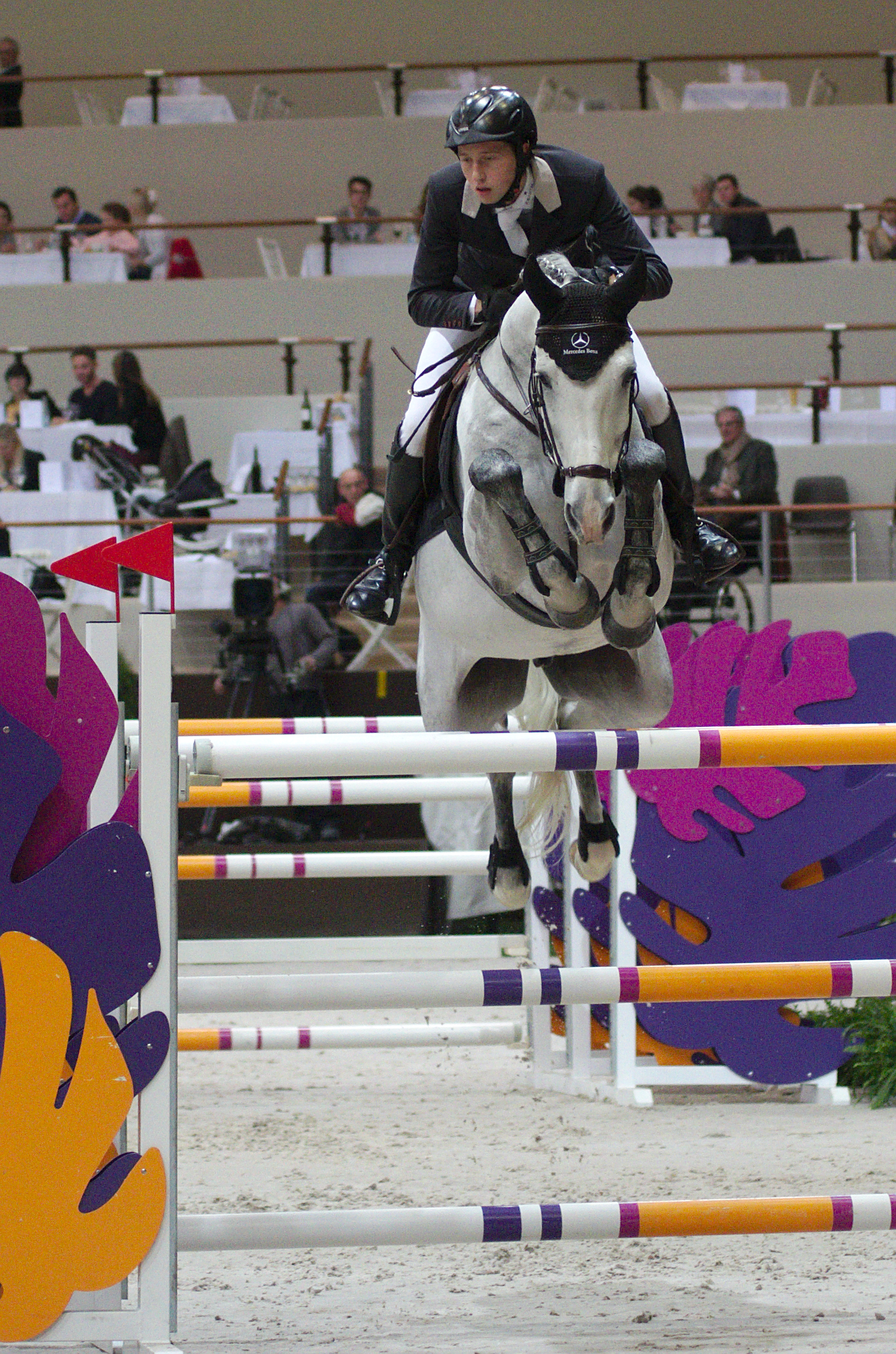 54eme CHI de Genève - 20141213 - Coupe de Genève - Martin Fuchs et Clooney 51